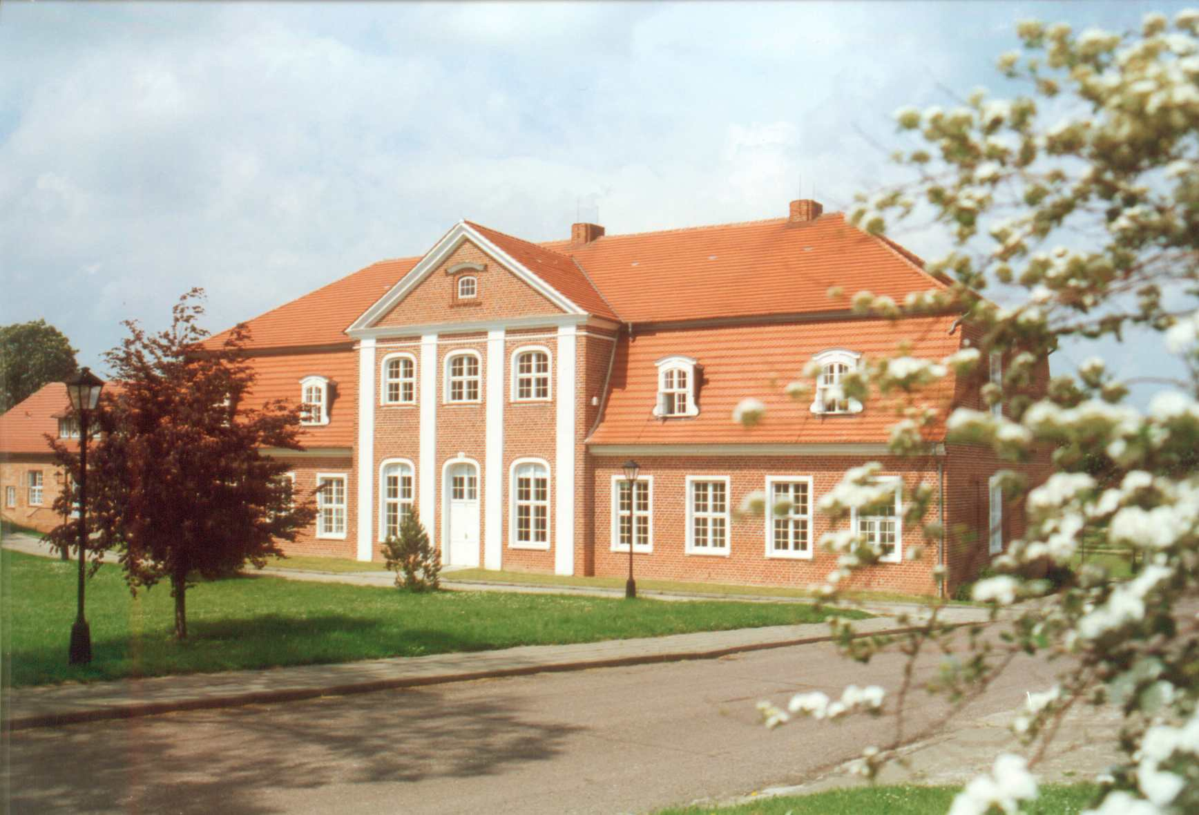 Sitz der FNR in Gülzow / Mecklenburg-Vorpommern